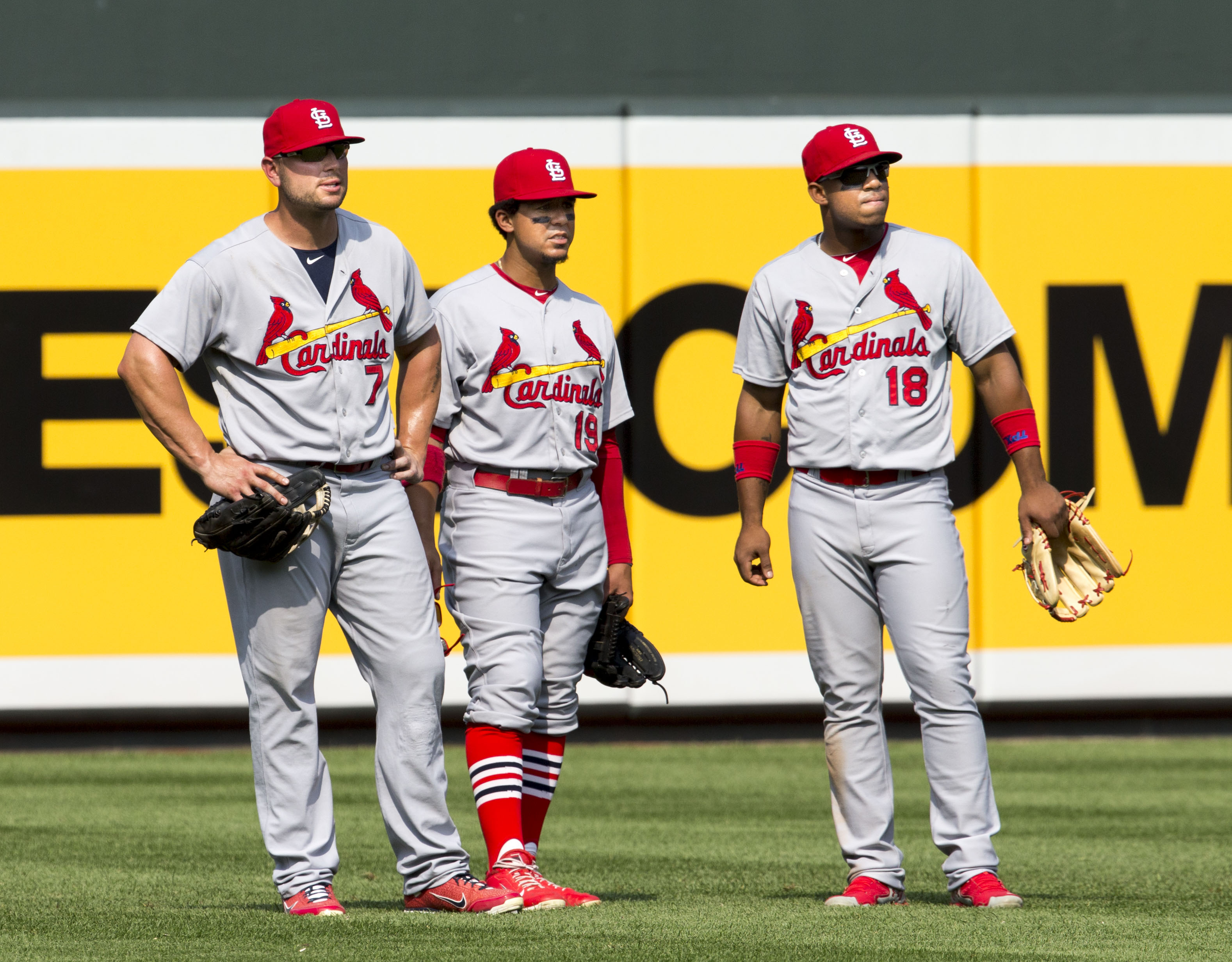 Cardinals at Orioles 8/10/14